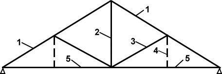 Схема элементов деревянной фермы.